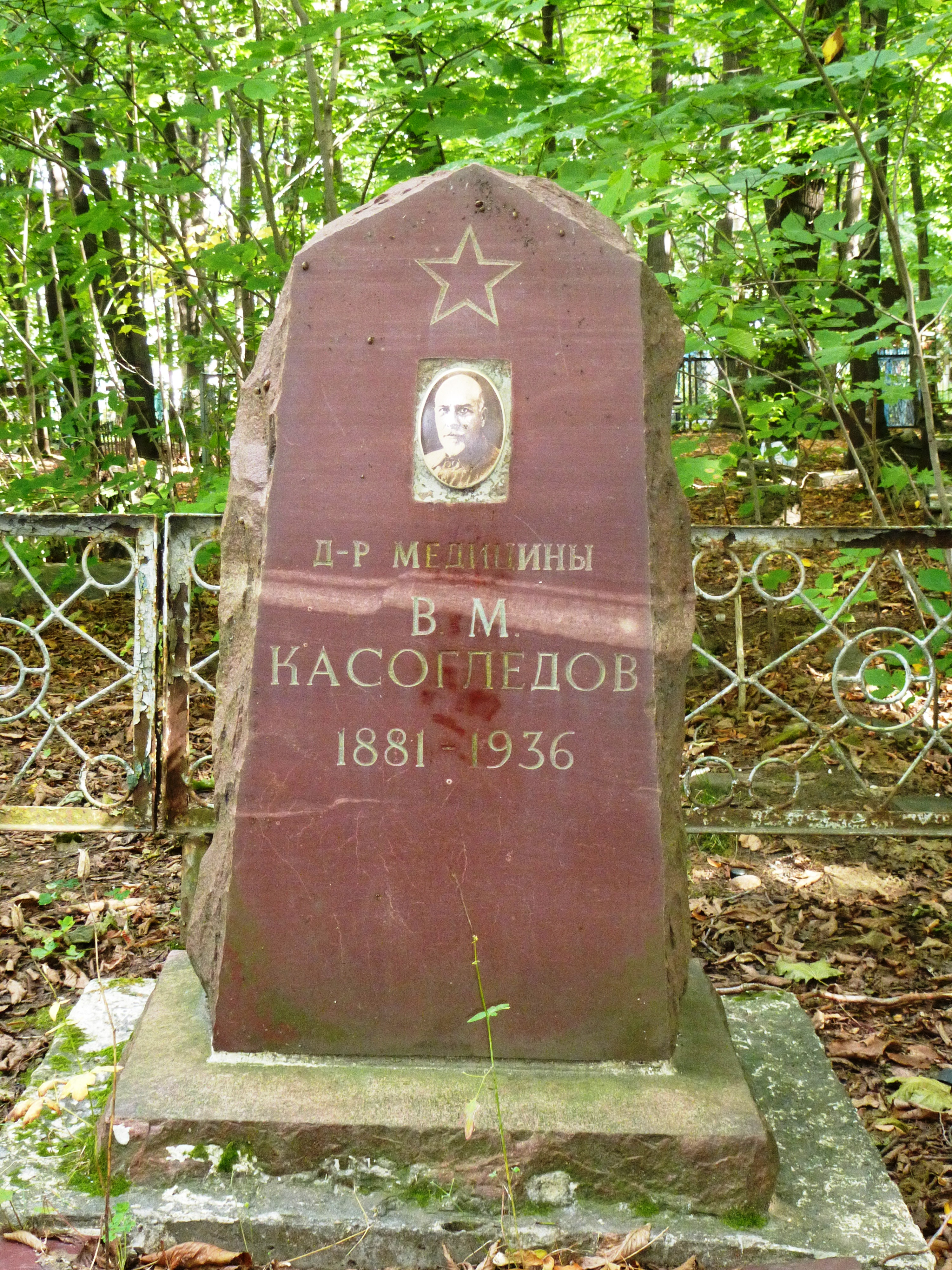 Памятник Василу Касогледову в Петрозаводске на Зарецком кладбище.